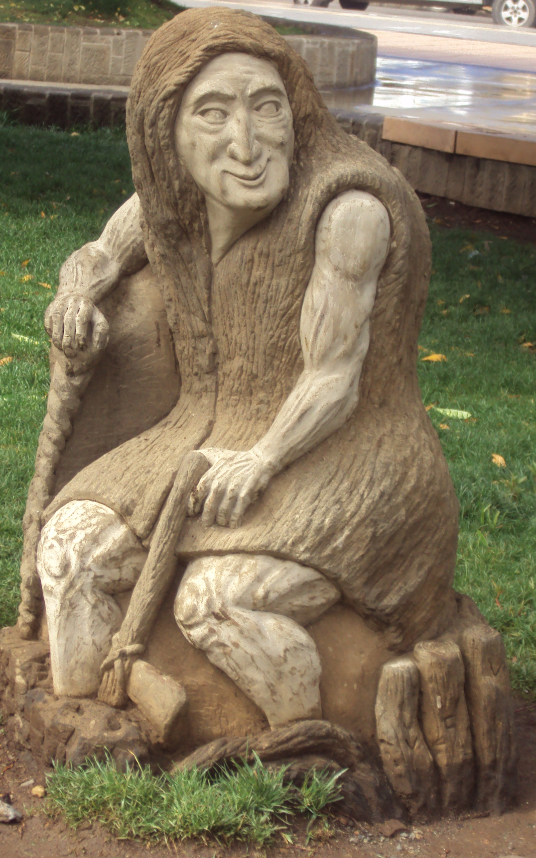 Estatua del Trauco en la Plaza de Ancud